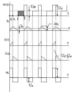 побудовано та заскрінено в ворді часові діаграми